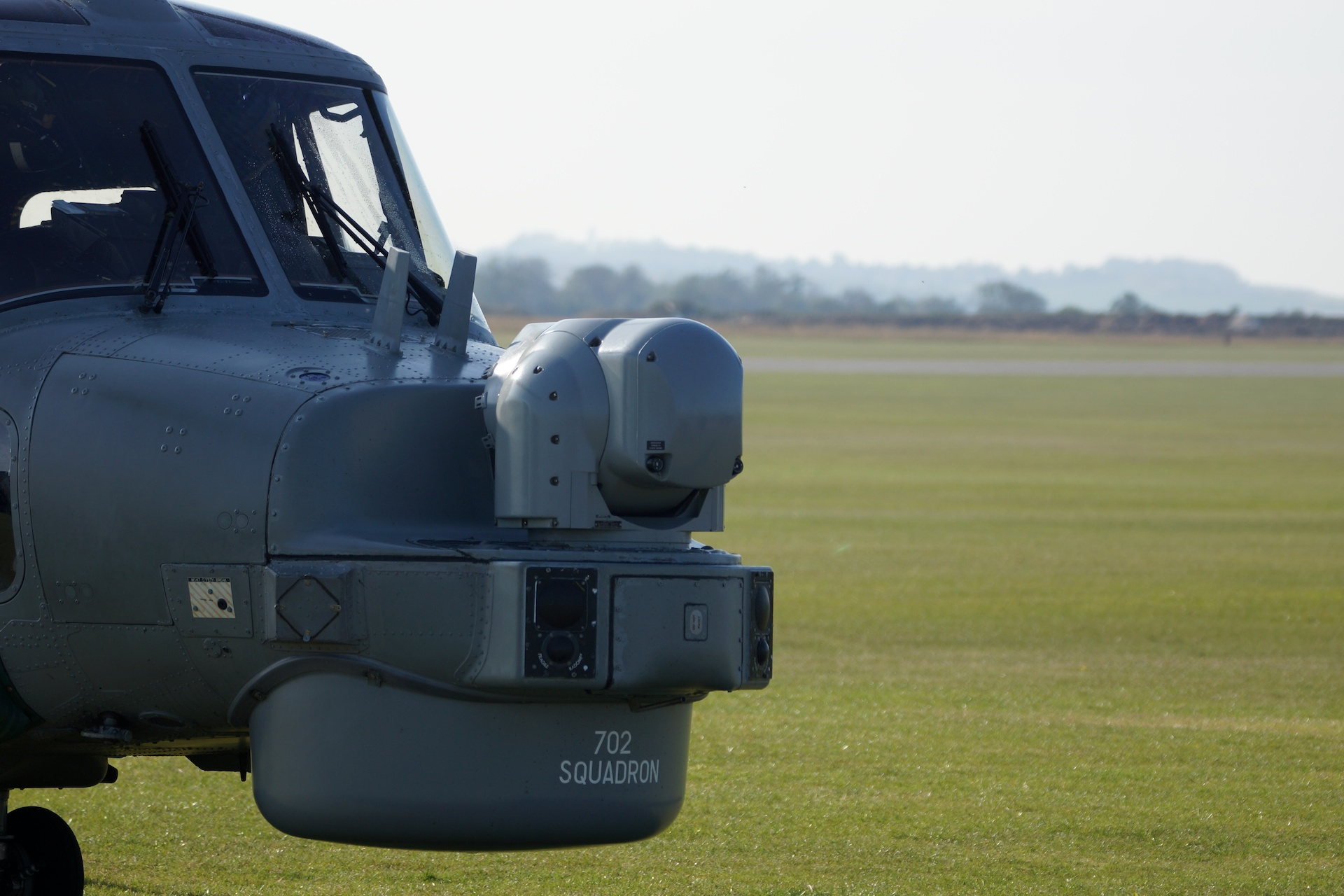 Lynx